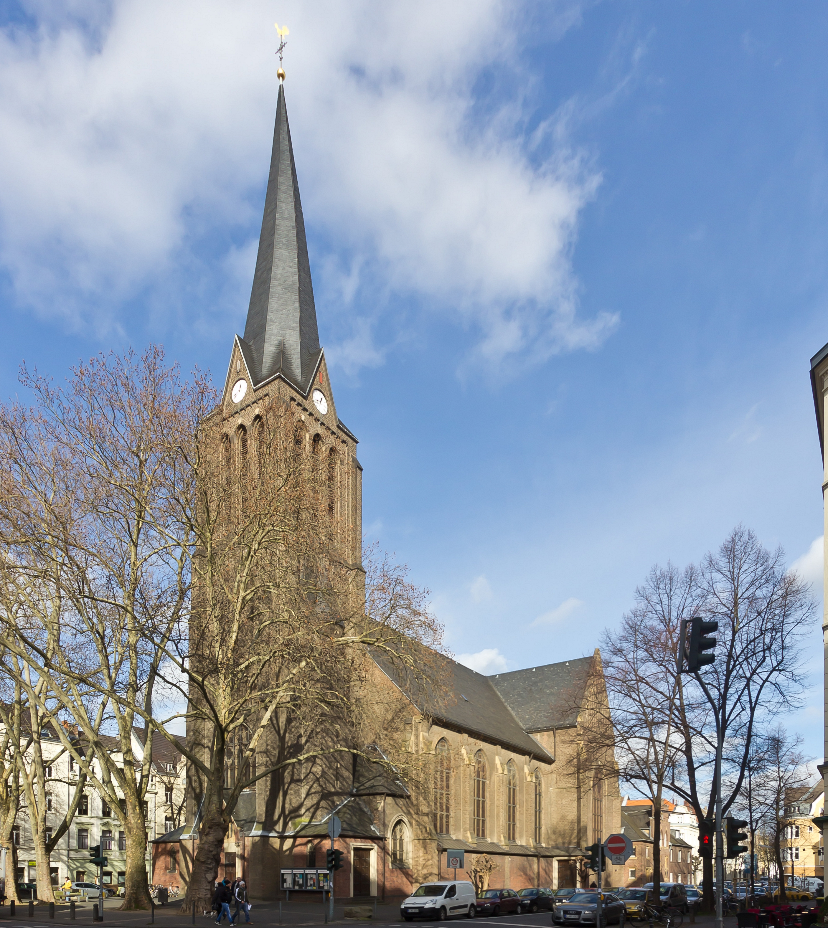 Denkmalgeschützte Kirche St. Peter, Köln-Neuehrenfeld